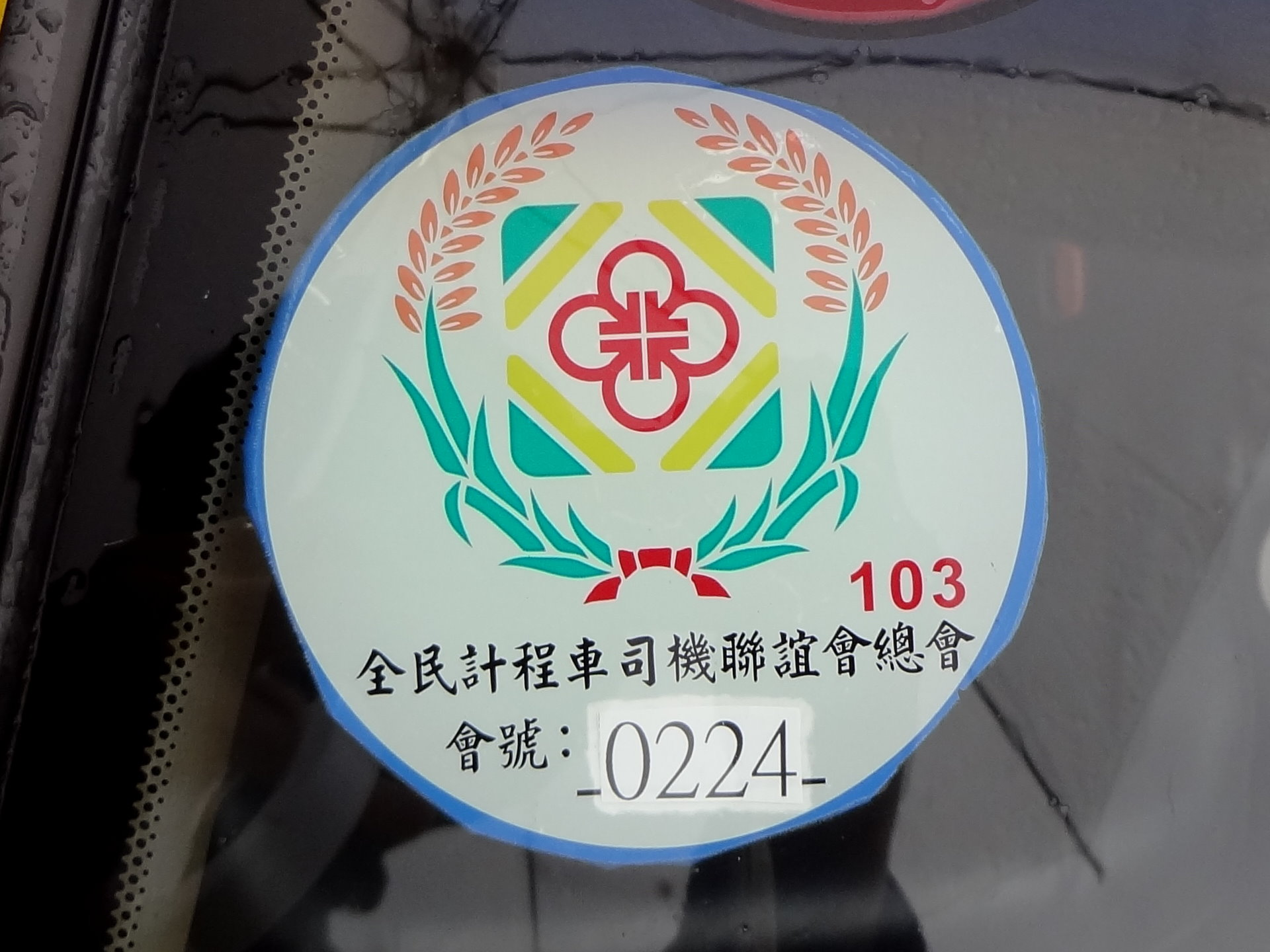 台灣全民計程車司機聯誼會總會會員證，貼在會員計程車擋風玻璃上。